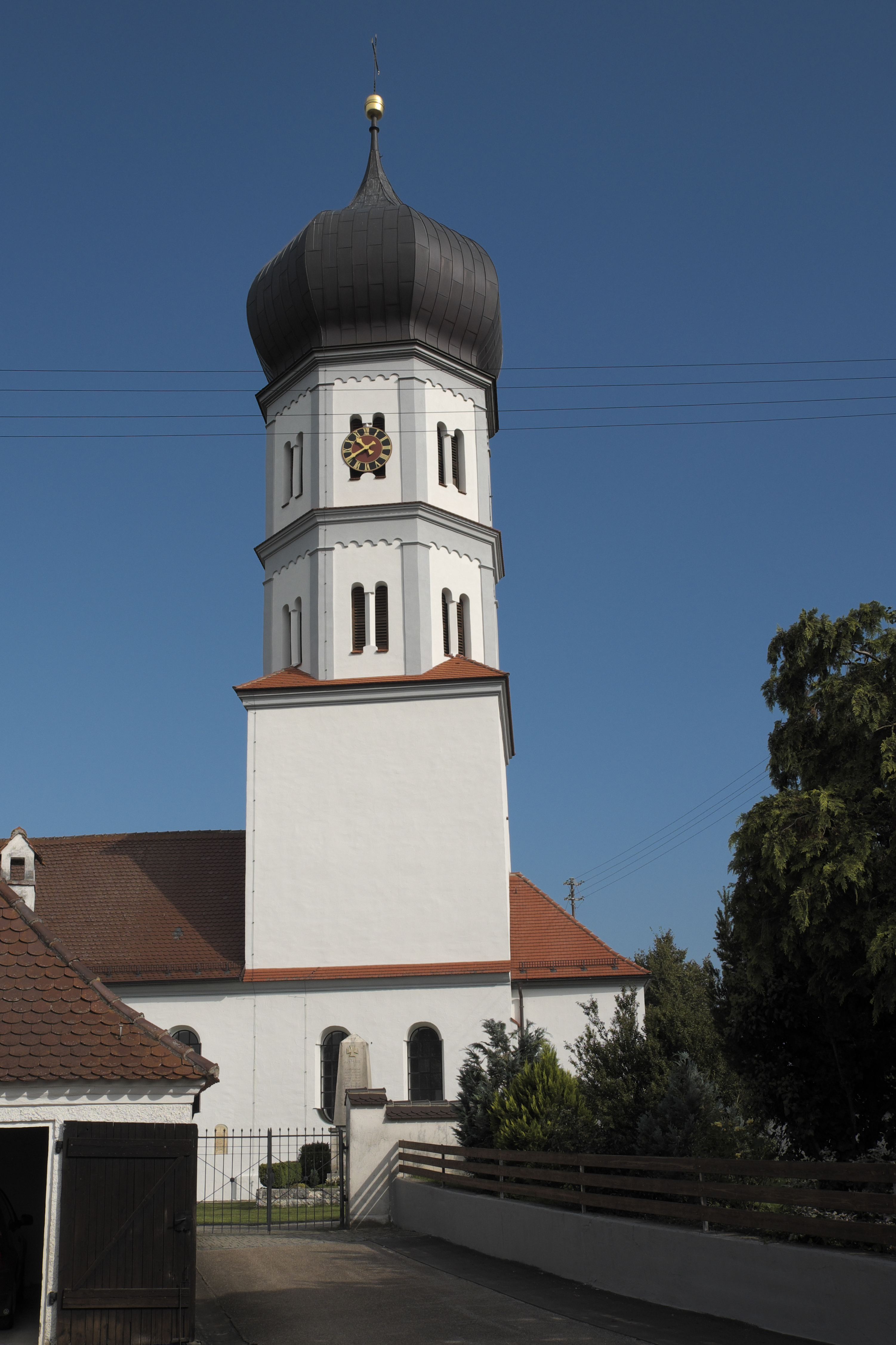 Katholische Pfarrkirche St. Veronika in Ziertheim (Landkreis Dillingen an der Donau/Bayern), Glockenturm